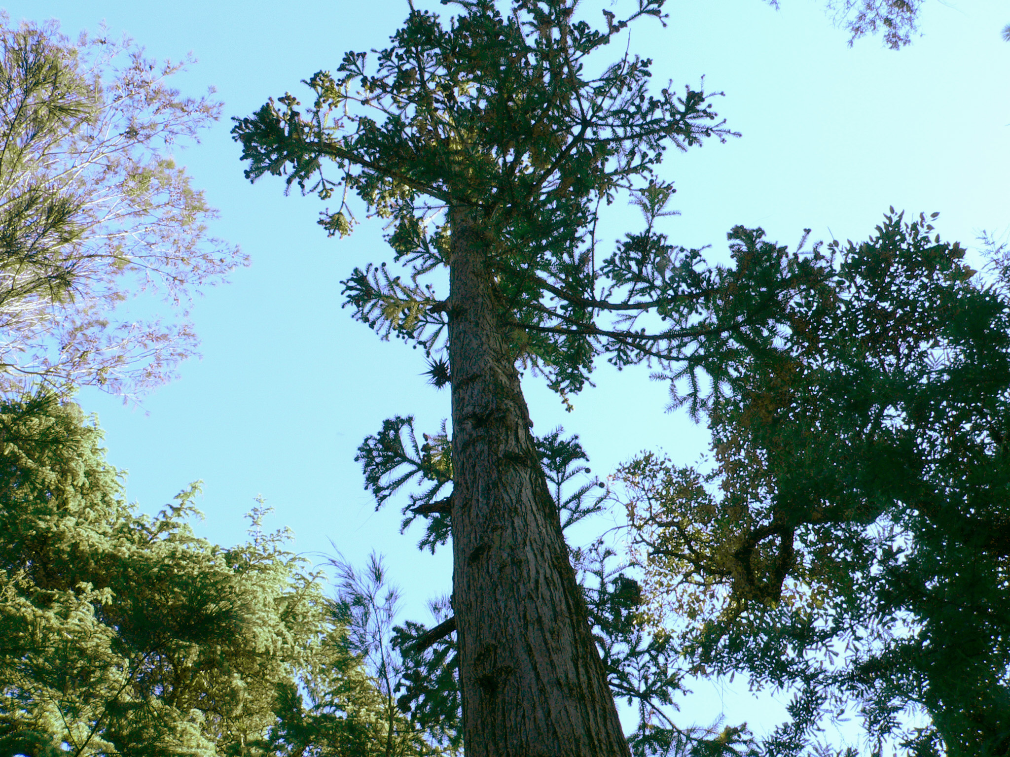 Cunninghamia lanceolata